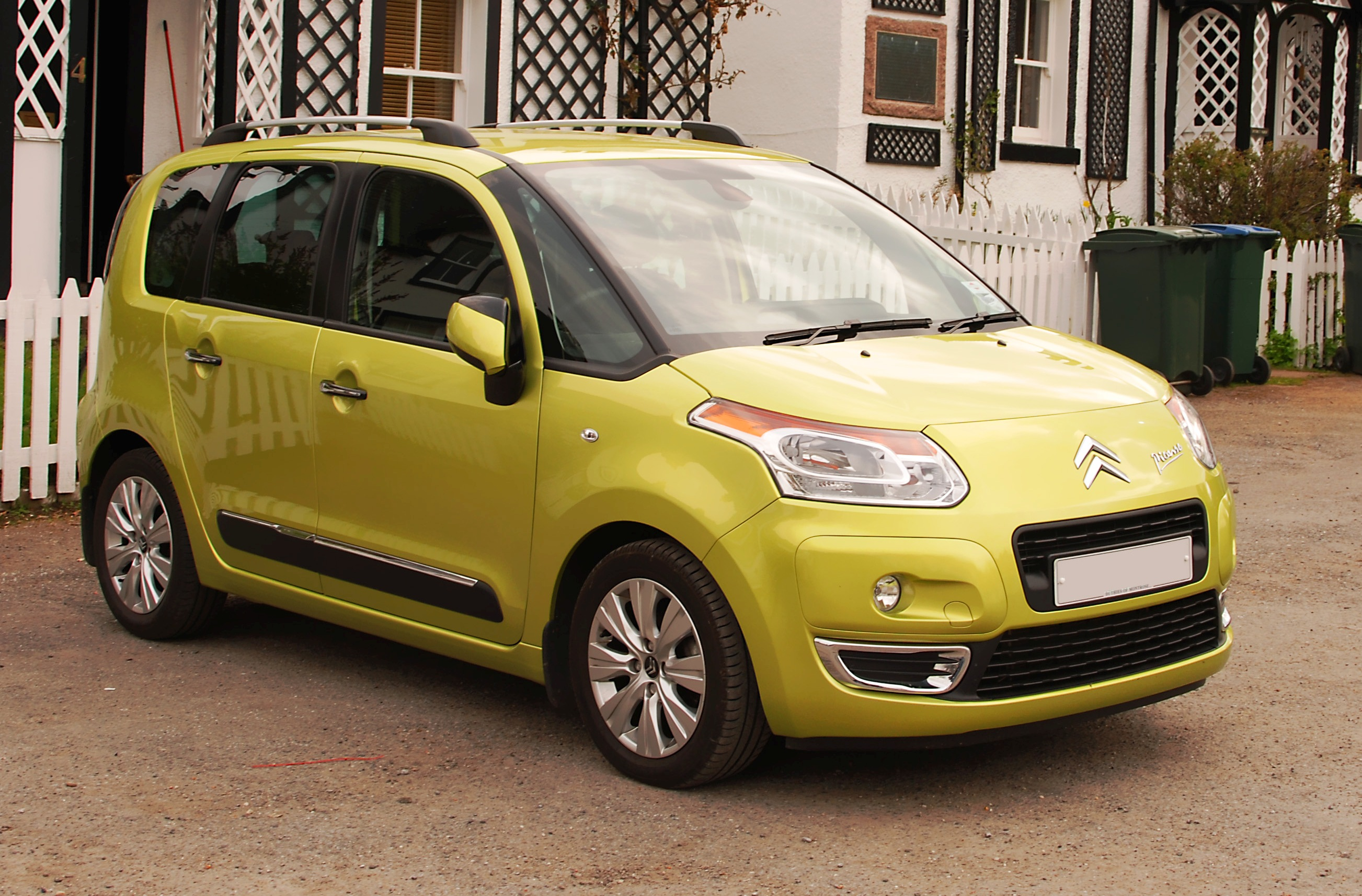 CitroenC3 Picasso